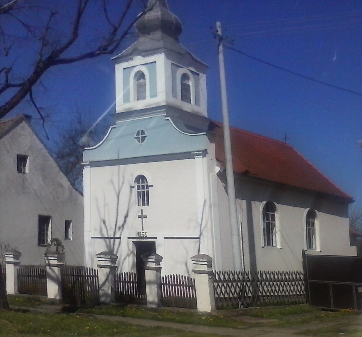 Ukrajinska grkokatolička crkva u Gornjim Andrijevcima kod Slavonskog Broda